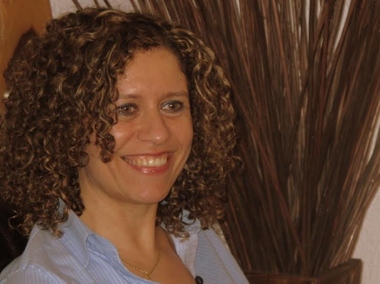 תמונת פורטרט של מונא מרון